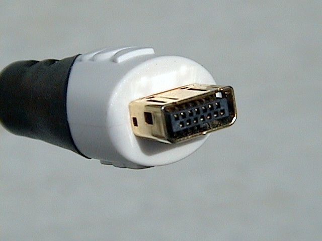 Mini-VGA connector for laptops